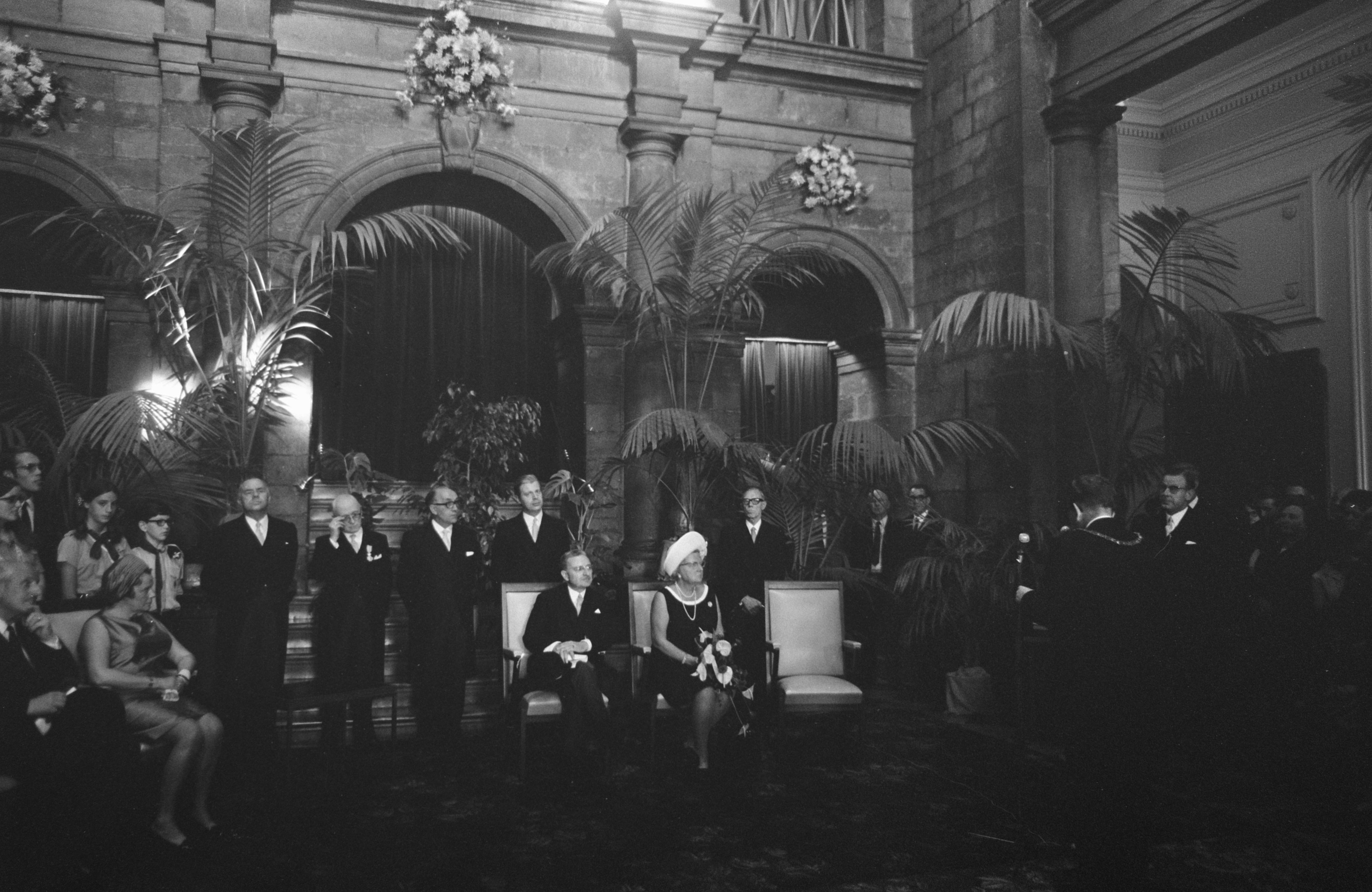 Collectie / Archief : Fotocollectie Anefo Reportage / Serie : [ onbekend ] Beschrijving : H. M. Kon. Juliana bezoekt Z. Limburg t.g.v. 25-j. herdenking van de bevrijding: H. M. bezoekt Maastricht; ontvangt bloemen in stadhuis en wordt hier toegesproken door burgemeester Fons Baeten (naast haar gouverneur Van Rooy)./ Datum : 13 september 1969 Trefwoorden : BLOEMEN, herdenkingen, ontvangsten, stadhuizen Persoonsnaam : Juliana, koningin Fotograaf : Mieremet, Rob / Anefo Auteursrechthebbende : Nationaal Archief Materiaalsoort : Negatief (zwart/wit) Nummer archiefinventaris : bekijk toegang 2.24.01.05 Bestanddeelnummer : 922-7857